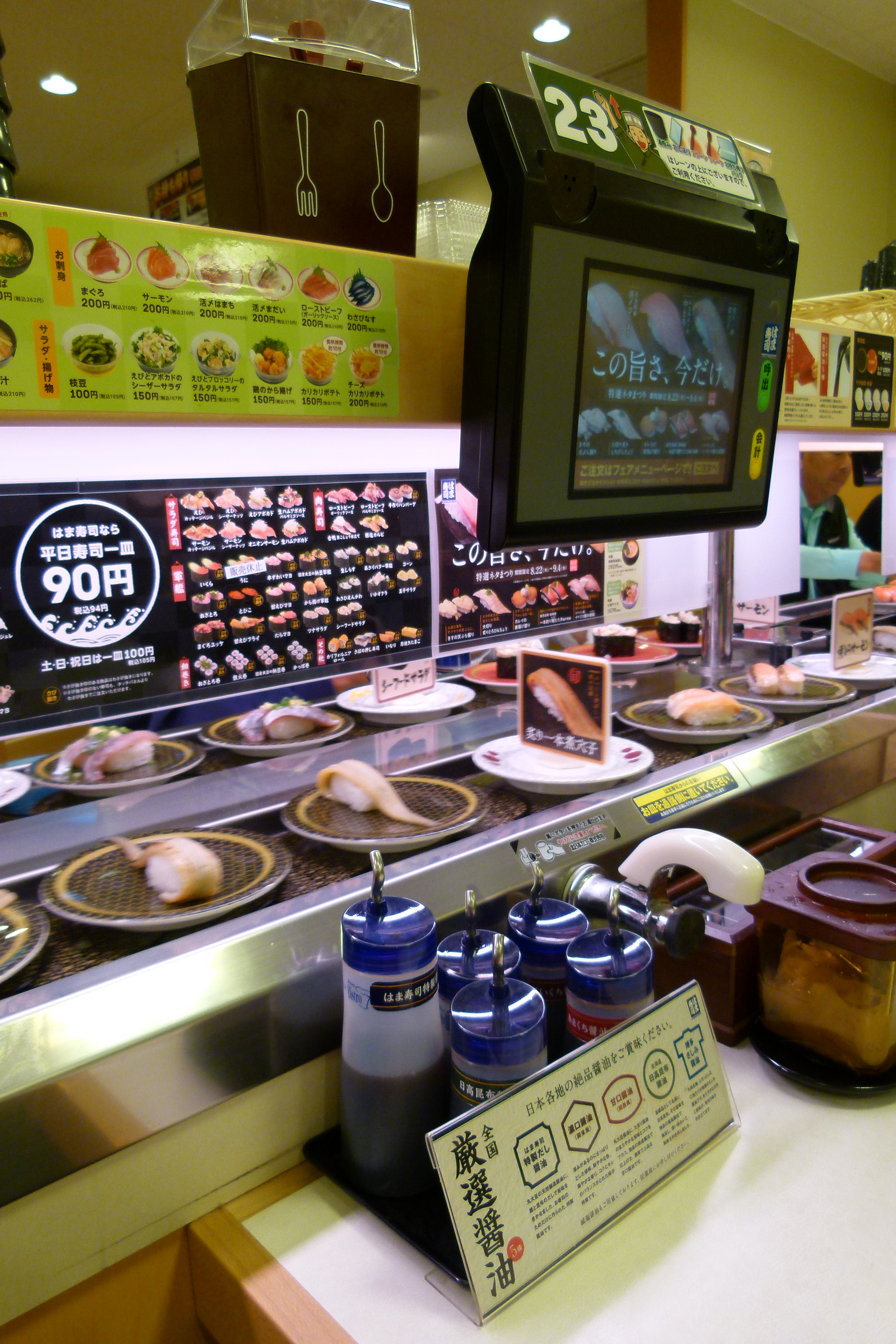 東広島市 西条 はま寿司